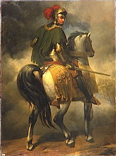 Copie d'après un original conservé au château de Beauregard